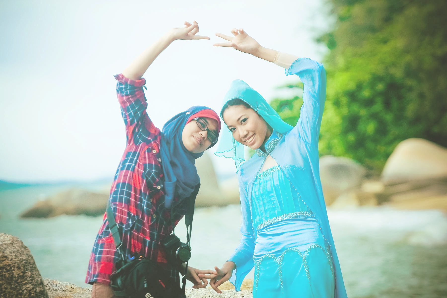 Malaysian females